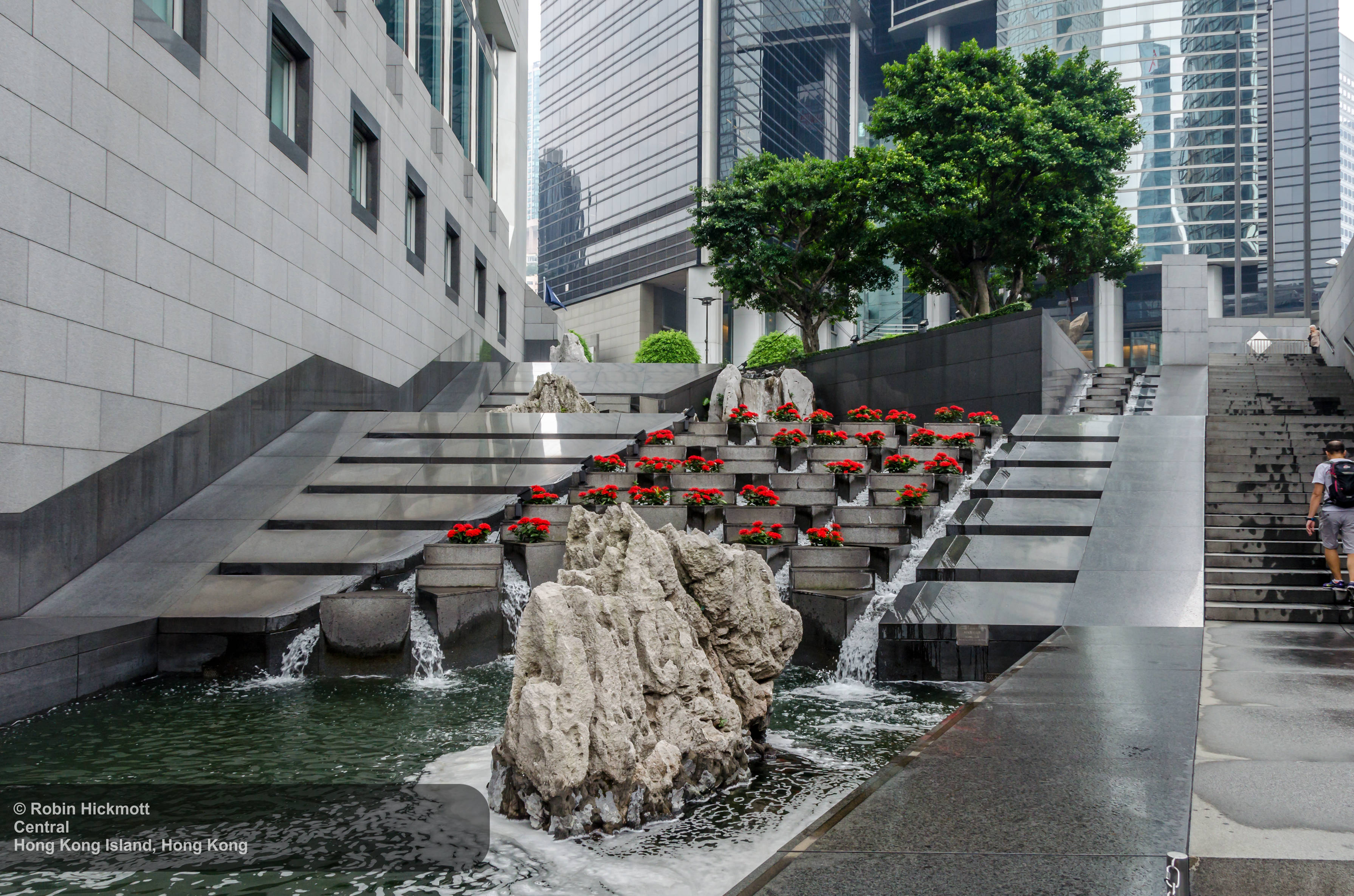 Hong Kong